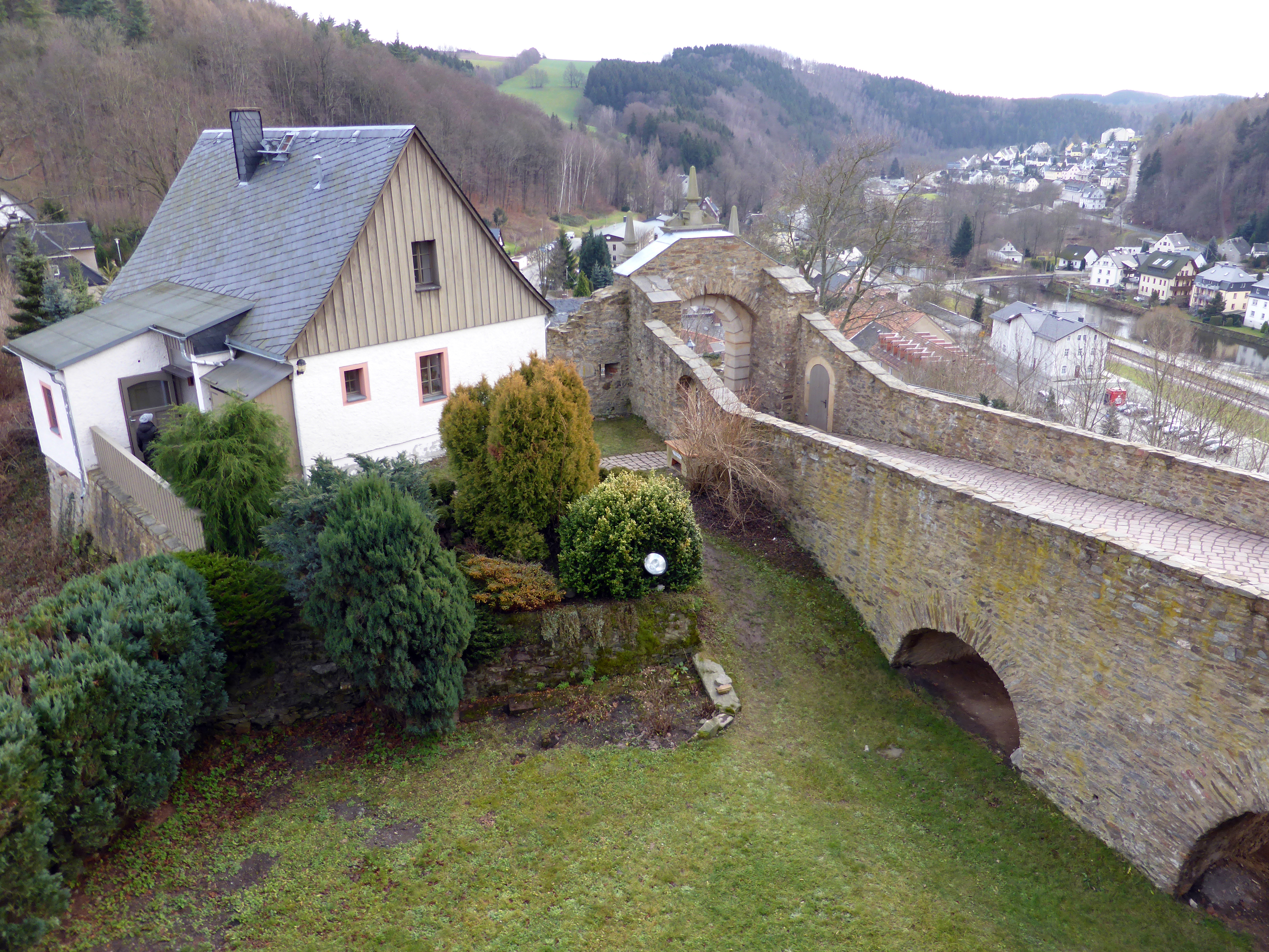 Burg Scharfenstein, Erzgebirgskreis - Sachsen.